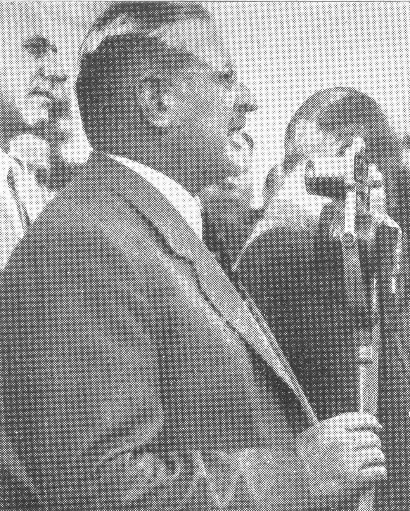 Revista Judicial nº 207: "Los partidos del norte de la provincia recibieron la visita del Gobernador Mercante".